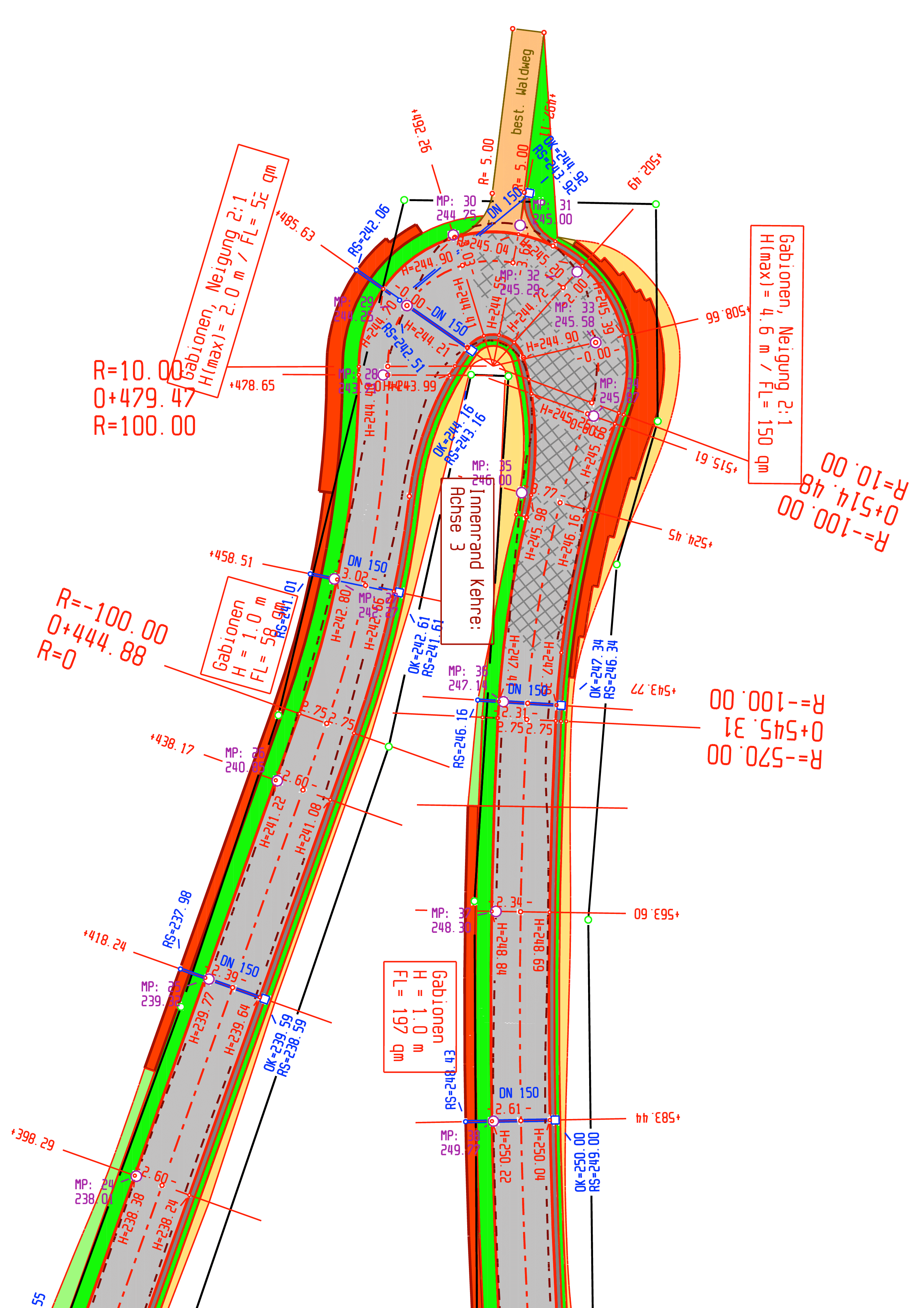 Darstellung eines Lageplanes mit Straßenachse